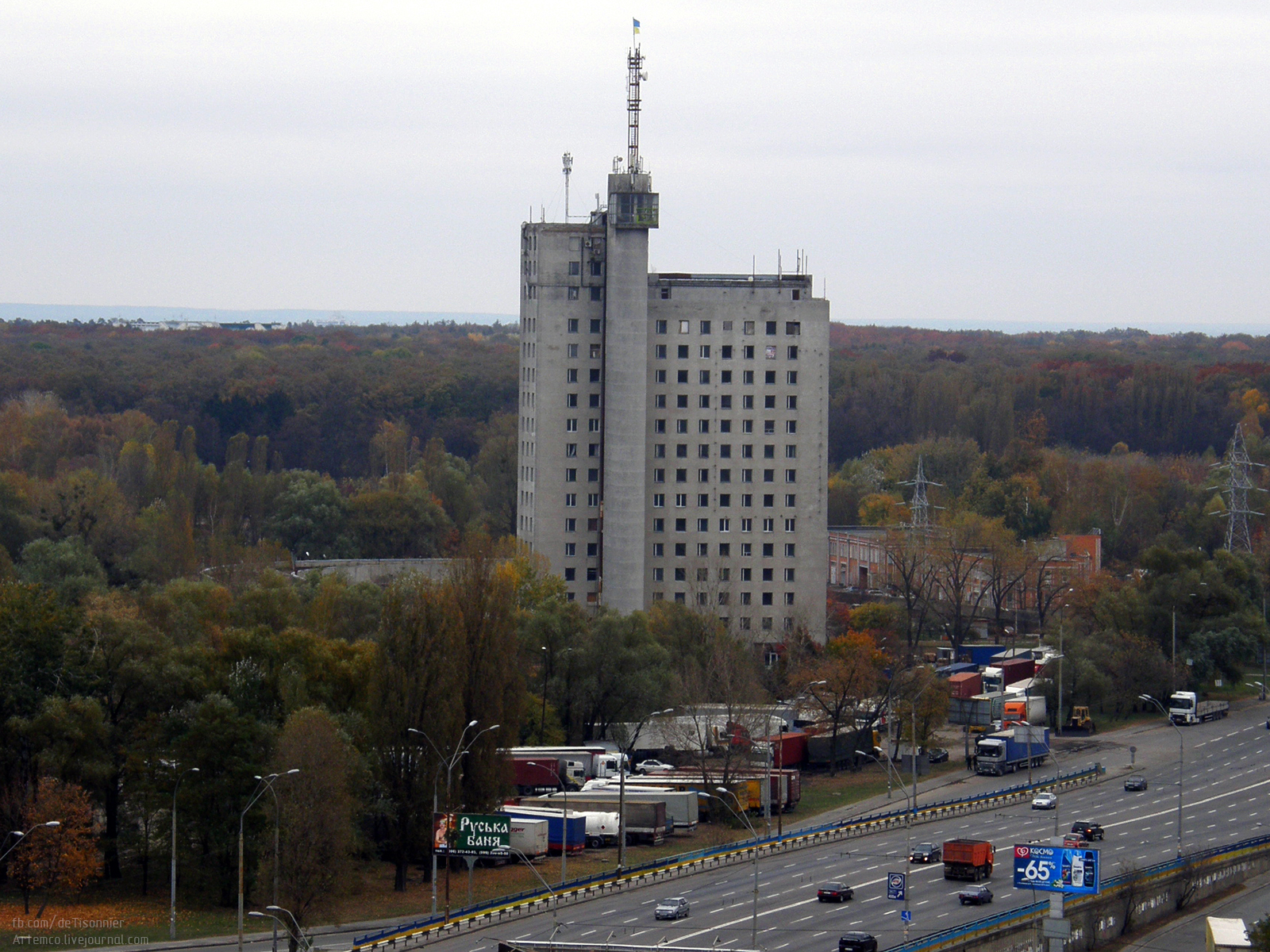 УкрДорЗв'язок